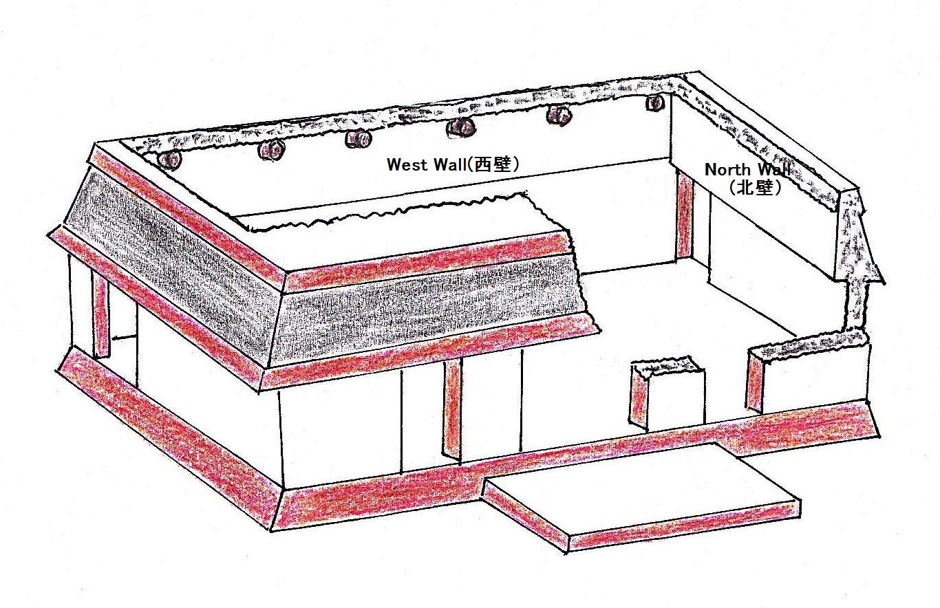 San Bartolo Pinturas Sub-1